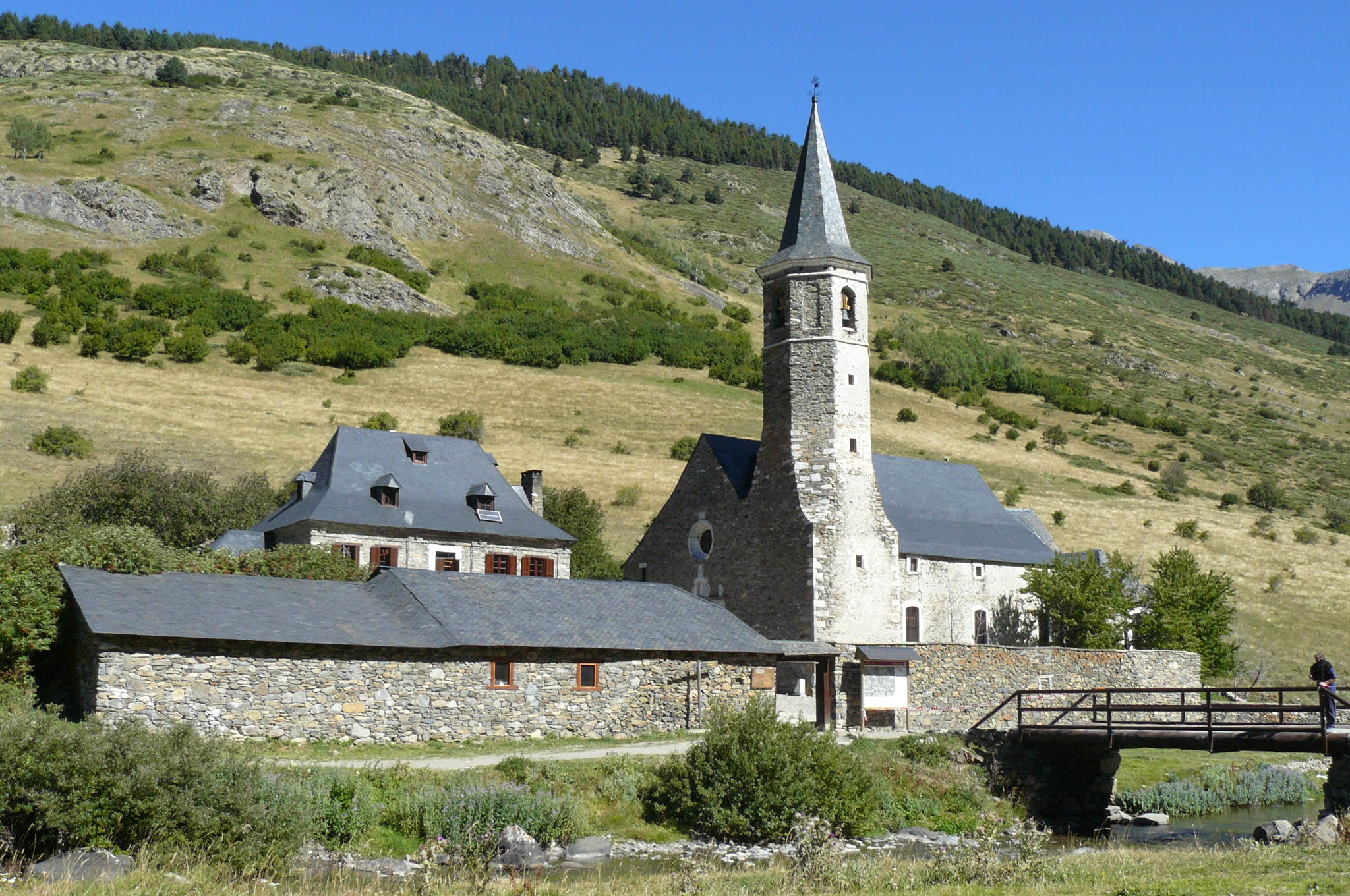 Santuari de Nostra Senyora de Montgarri